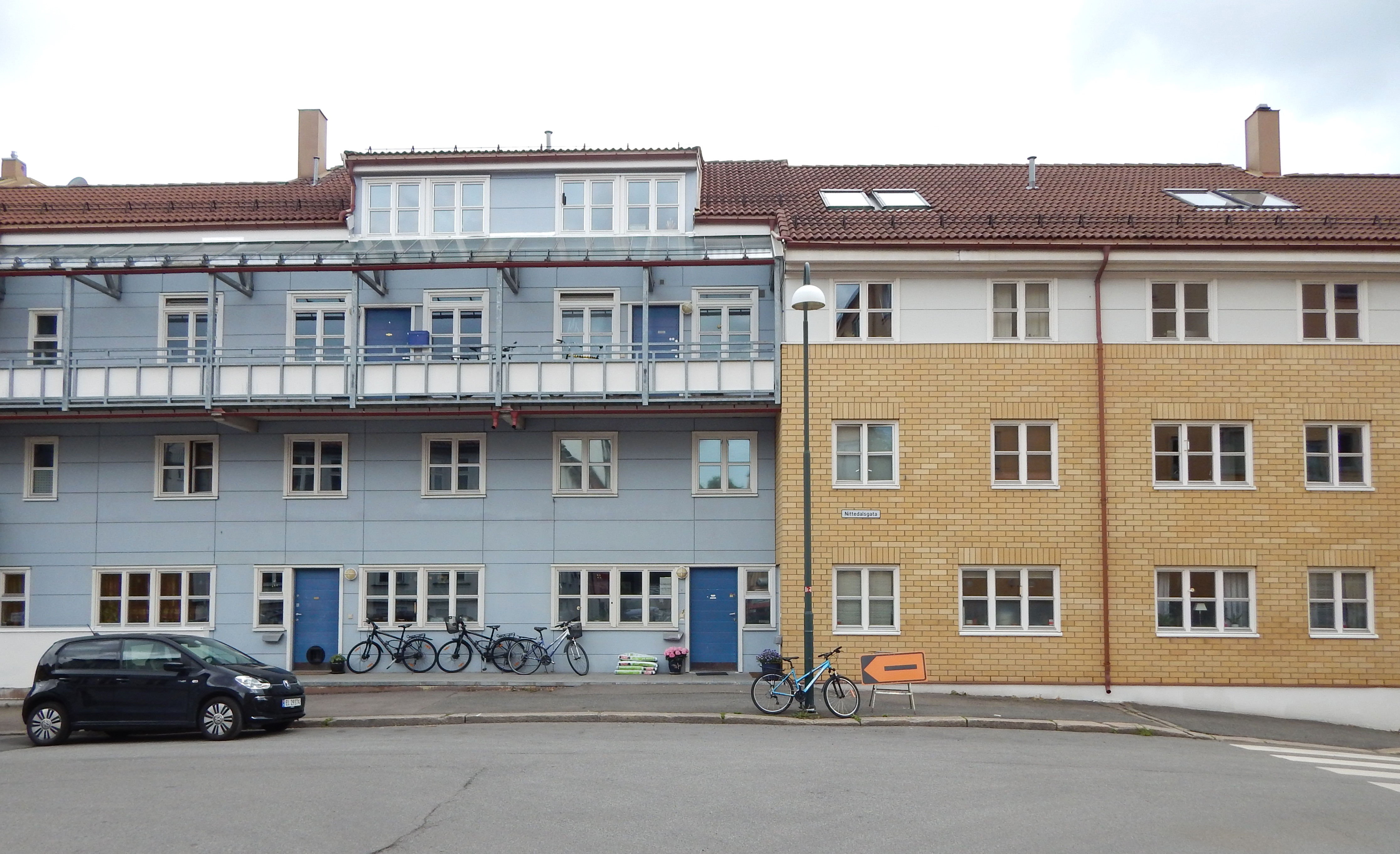 Nittedalsgata